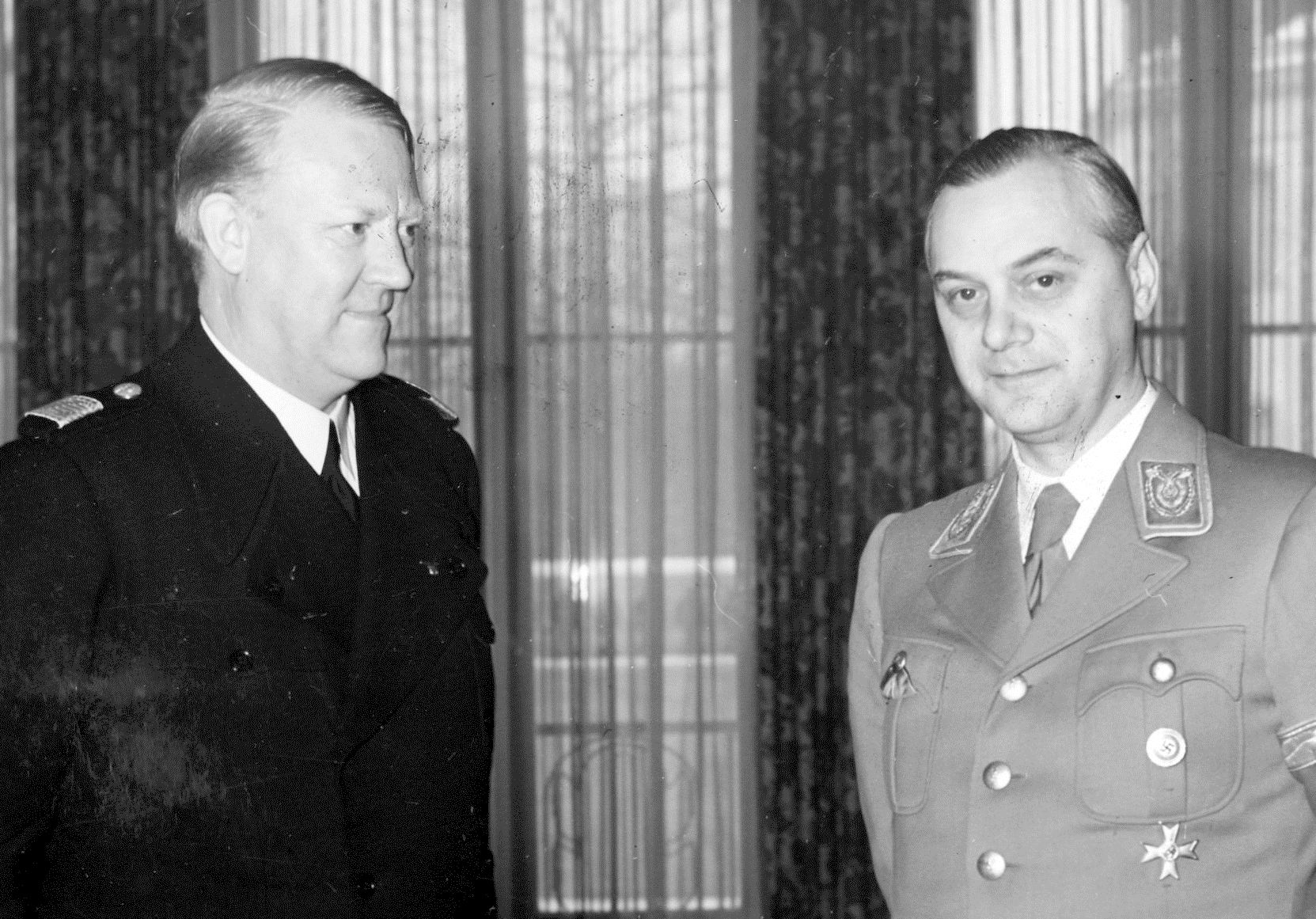 52586 Norwegens Ministerpräsident Quisling bei Reichsminister Rosenberg Reichsminister Alfred Rosenberg empfing an Freitag dengegenwärtig zu einem Besuch in Berling weilenden norwegischen Ministerpräsidenten und Leiter des Nasjonal Samling, Vidkun Quisling.